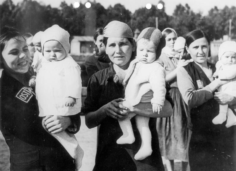 Ostarbeiterinnen in Deutschland mit ihren Kleinsten nach Feierabend.